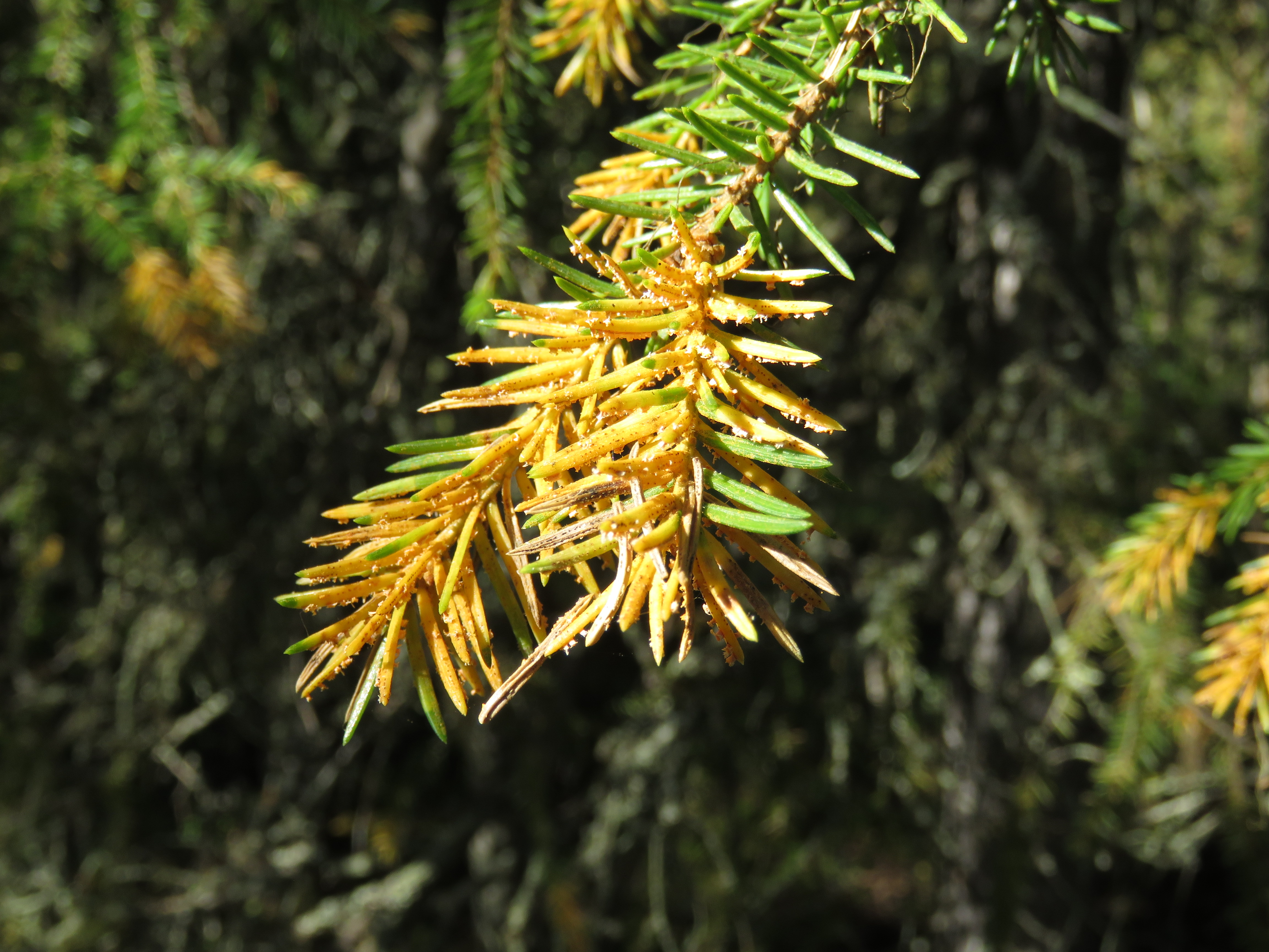 Kuusensuopursuruostetta (Chrysomyxa ledi) metsäkuusessa (Picea abies) Rovaniemellä 2015